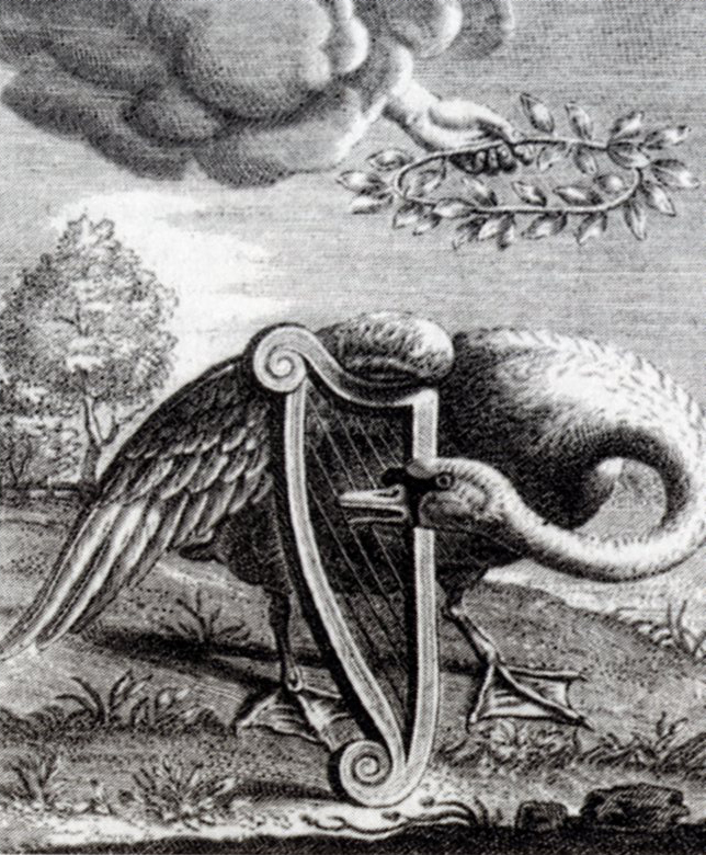 Gravure titelpagina liederenbundel "Den singende swaen" van pastoor Willem de Swaen te Gouda